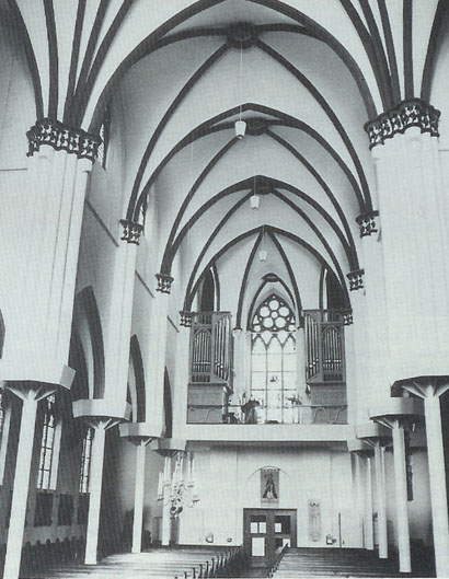 eigen collectie